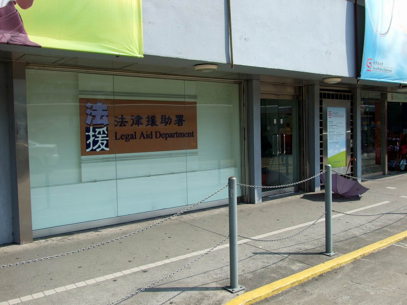 法律援助署九龍分署